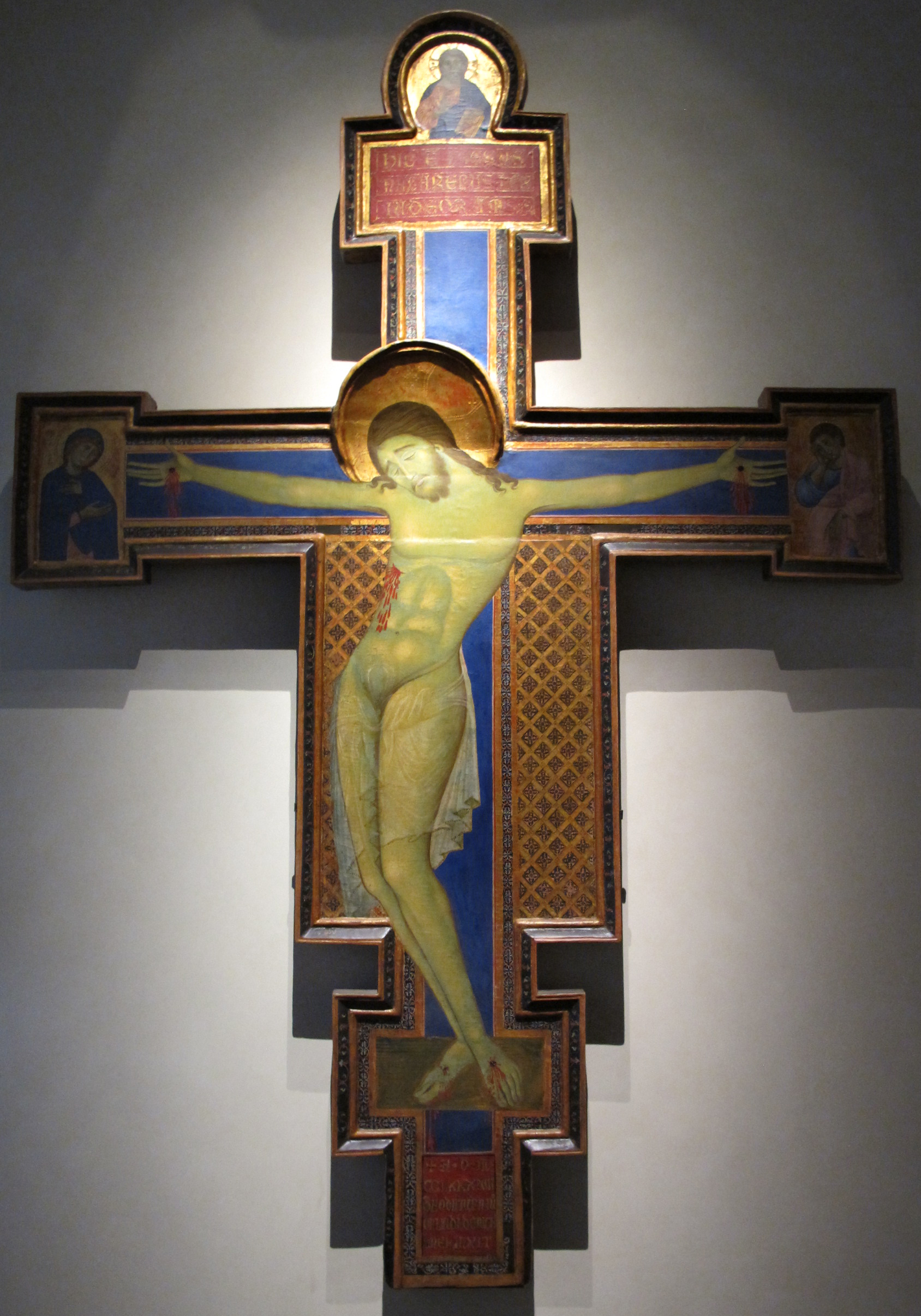 crocifisso coi dolenti